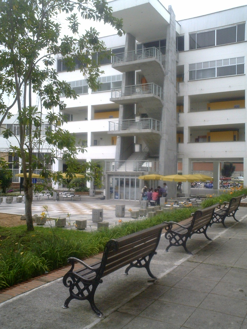 Plazoleta en el Campus Palogrande de la Universidad Nacional de Colombia, sede Manizales